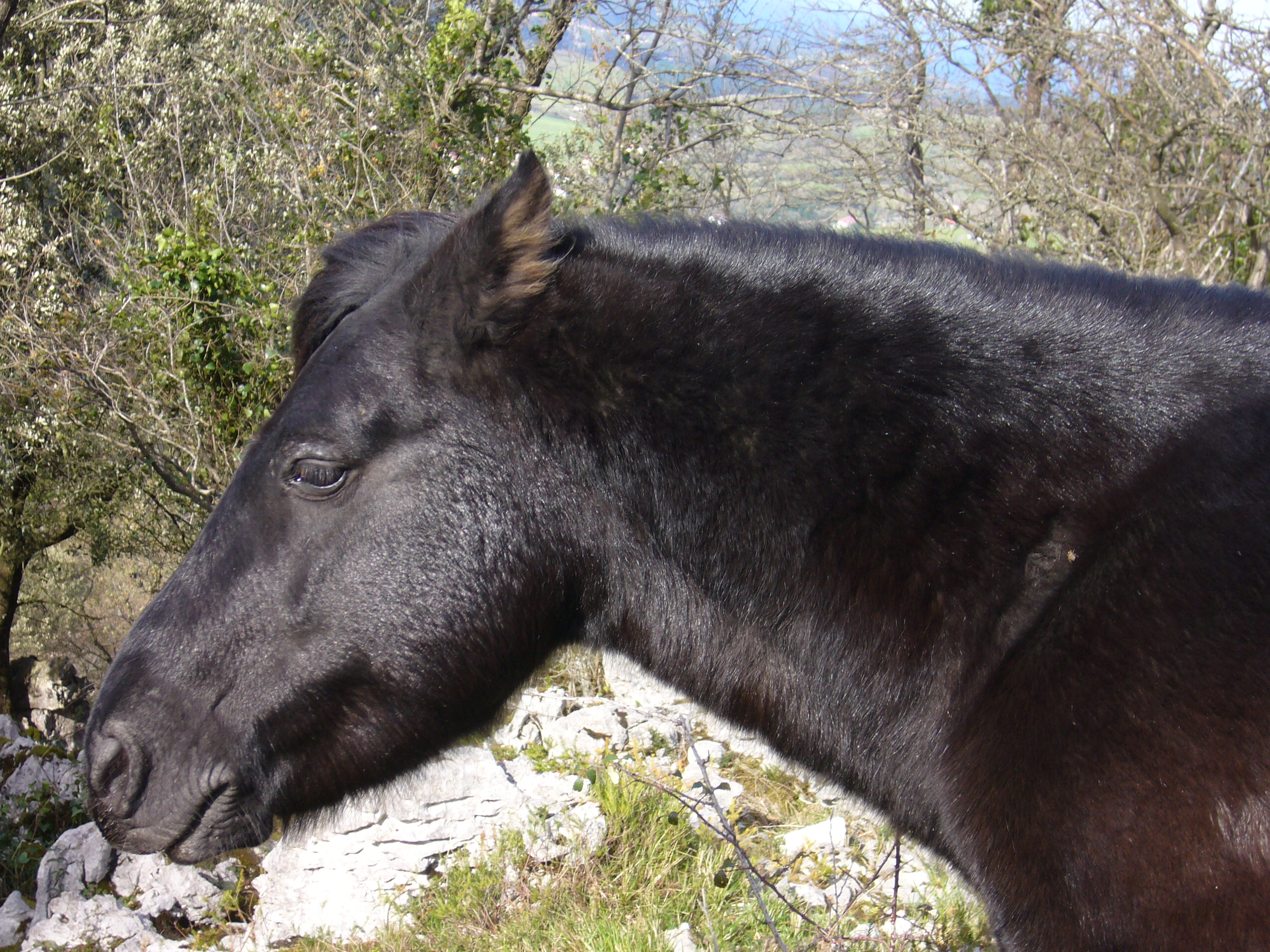 Pottoka zaldi baten burua. Gipuzkoako Pottoka Elkartearen sementala da